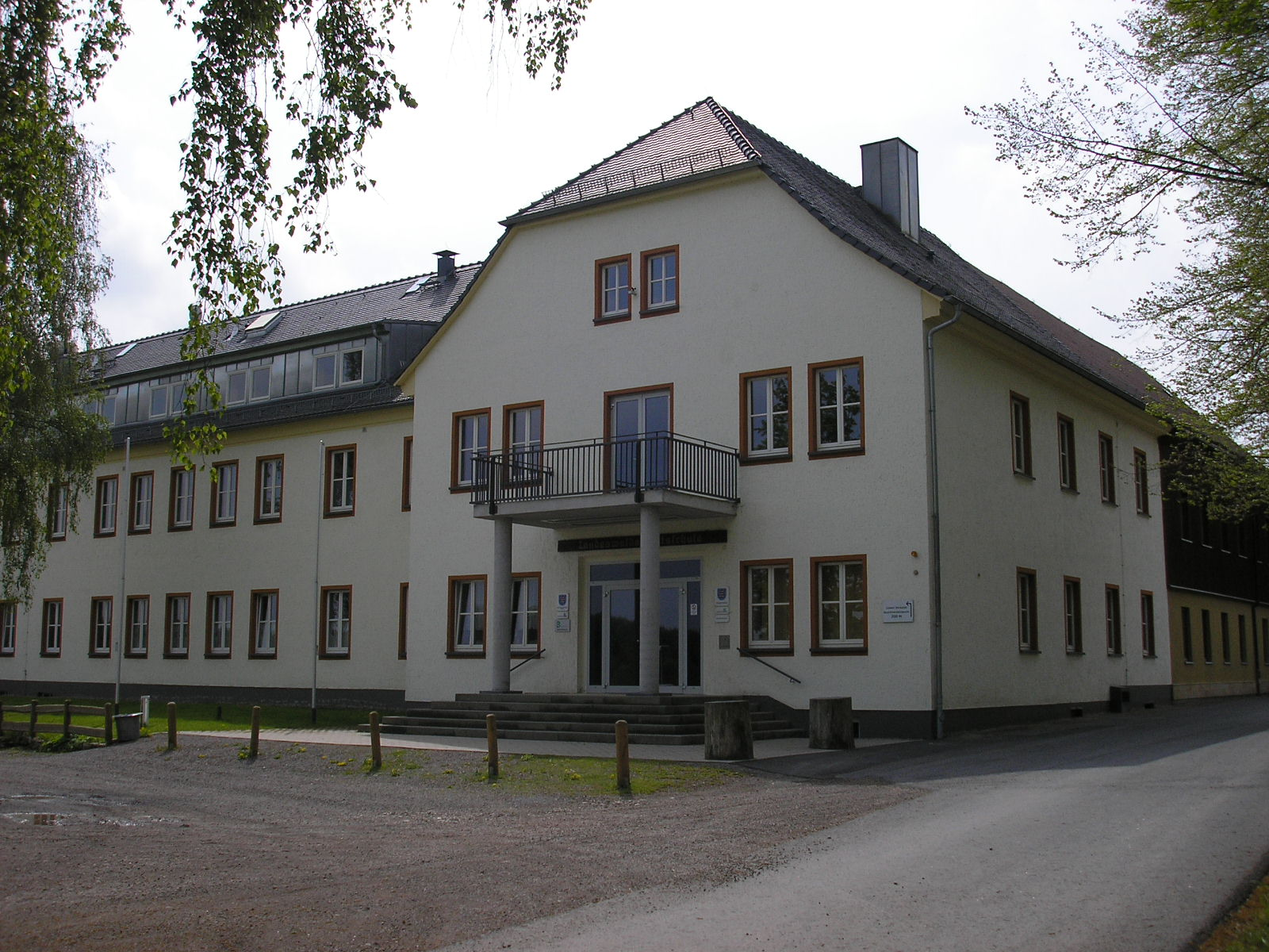 Landeswaldarbeiterschule in Gehren (Thüringen).